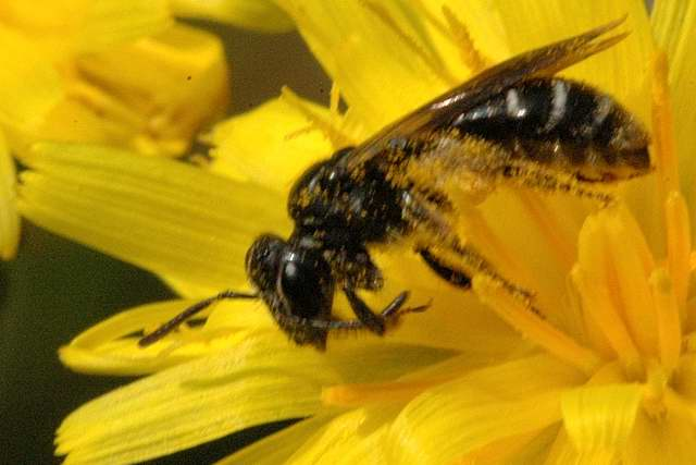 Halictus tumulorum female